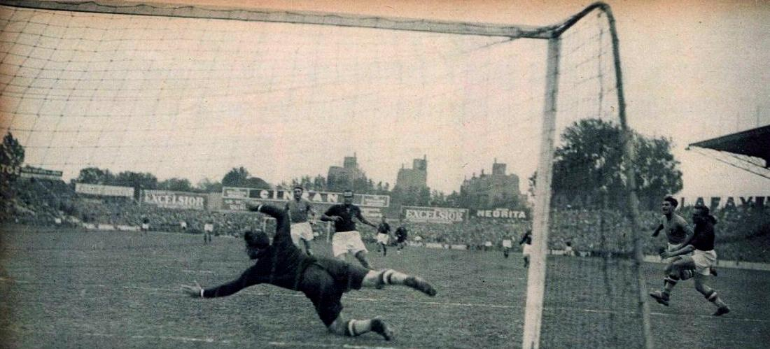 Finale de la Coupe du monde 1938 à Colombes (France), Colaussi marque le deuxième but italien.